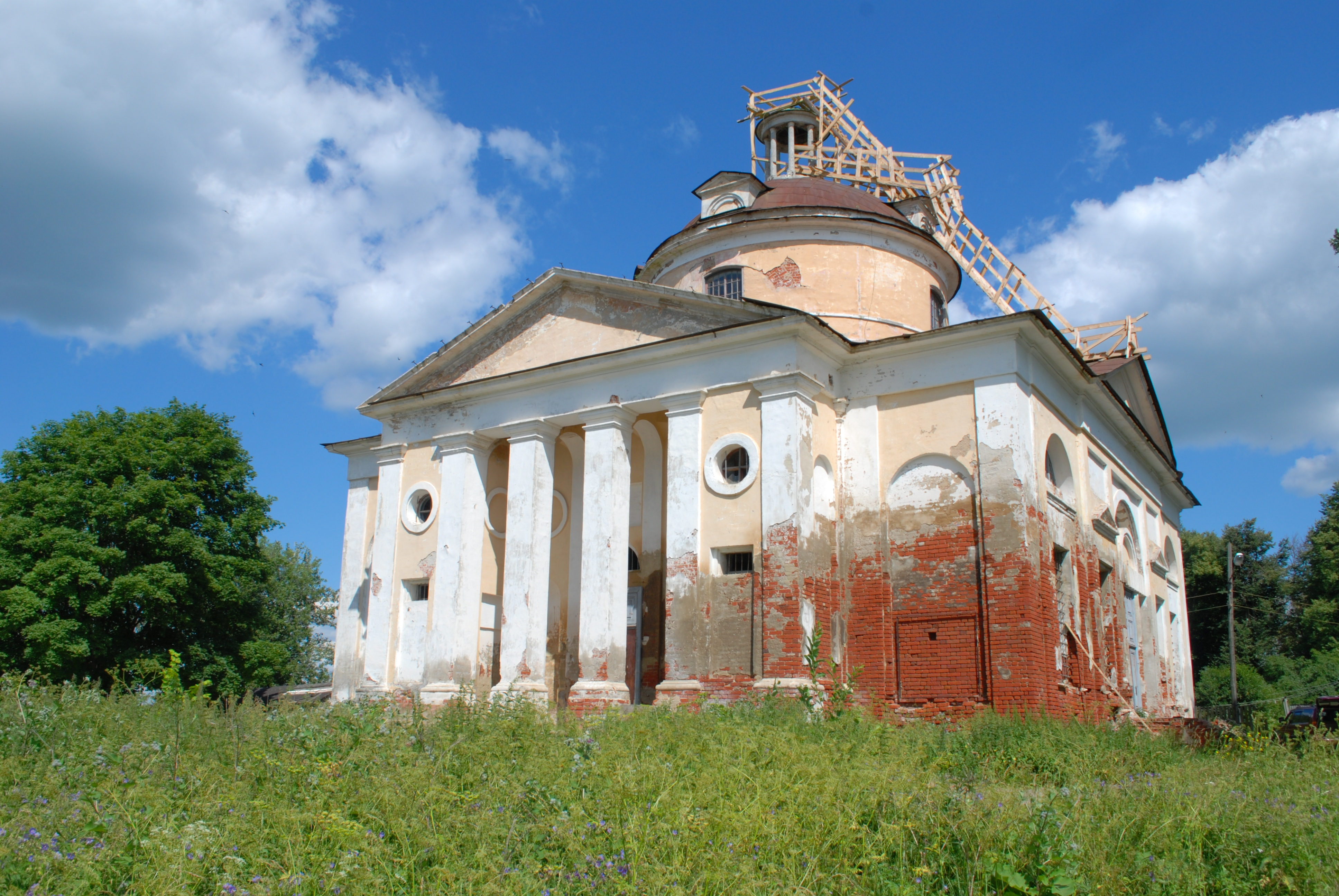 Церковь Покрова Богородицы (Владимирская область, Кольчугино, деревня Есиплево)